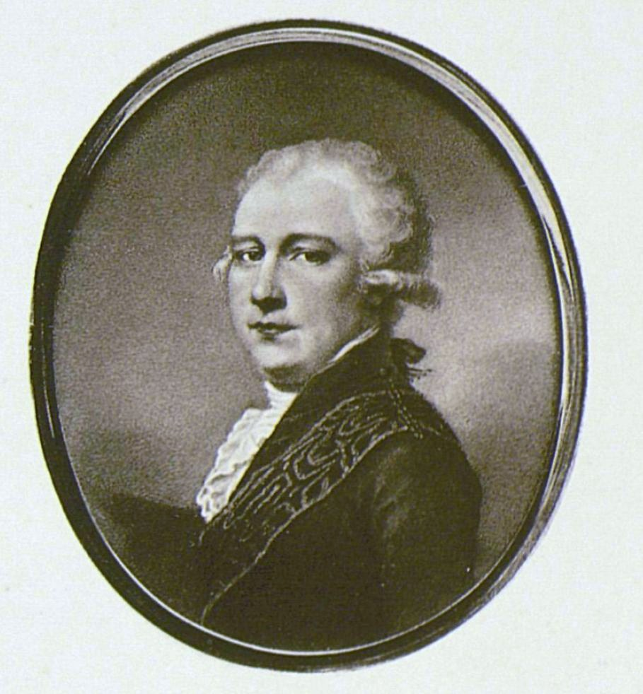 Граф Головин Николай Николаевич (1756-1820), муж известной мемуаристки Варвары Николаевны Головиной.